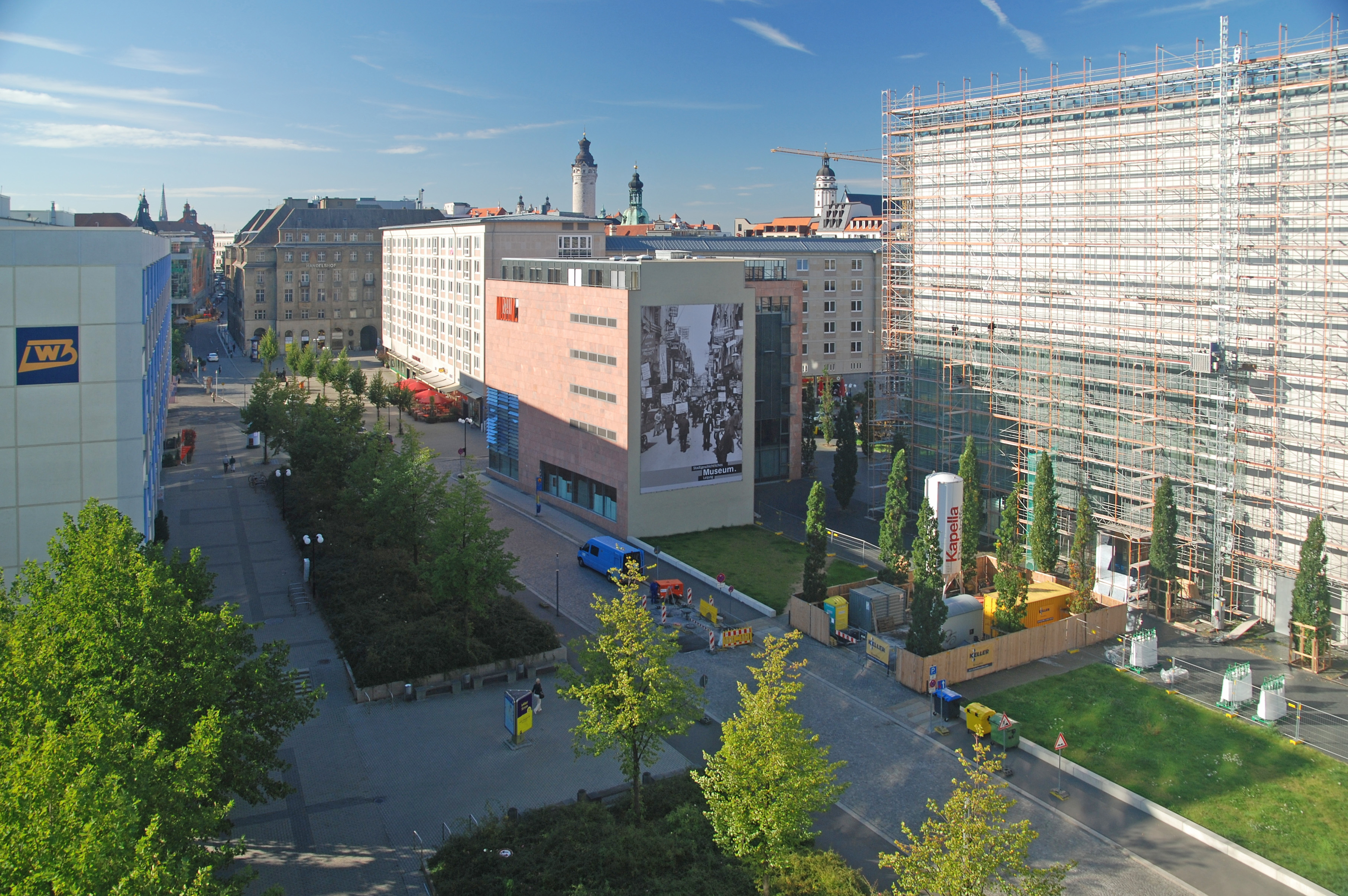 Stadtgeschichtliches Museum Leipzig